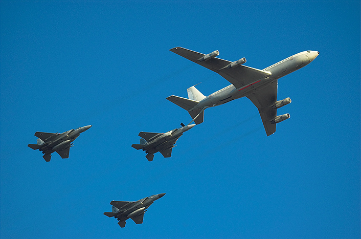 IAF F-15 "Baz" refueling from IAF Boeing 707